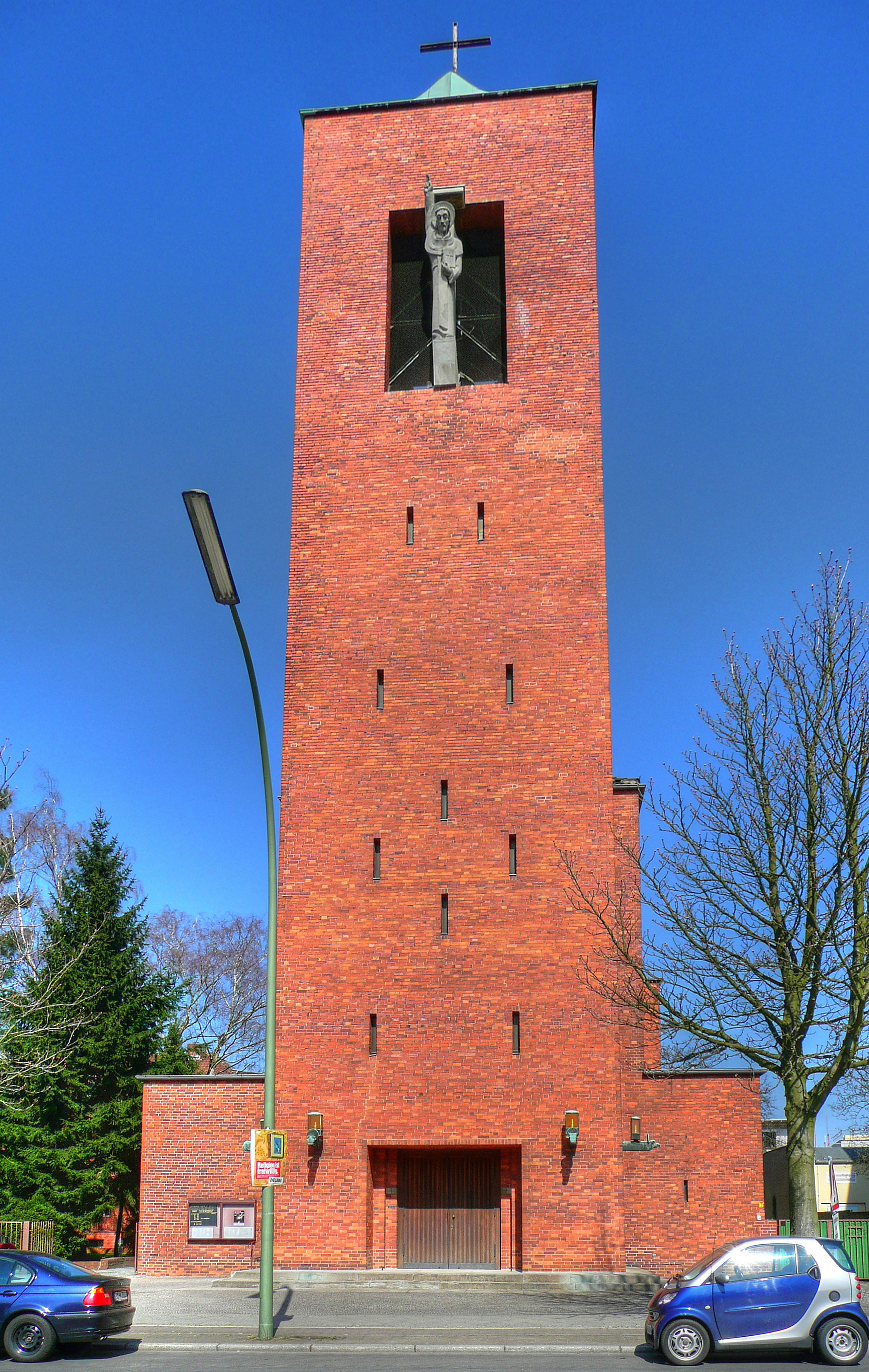 Turm der katholischen Pfarrkirche St. Bernhard in Berlin-Dahlem